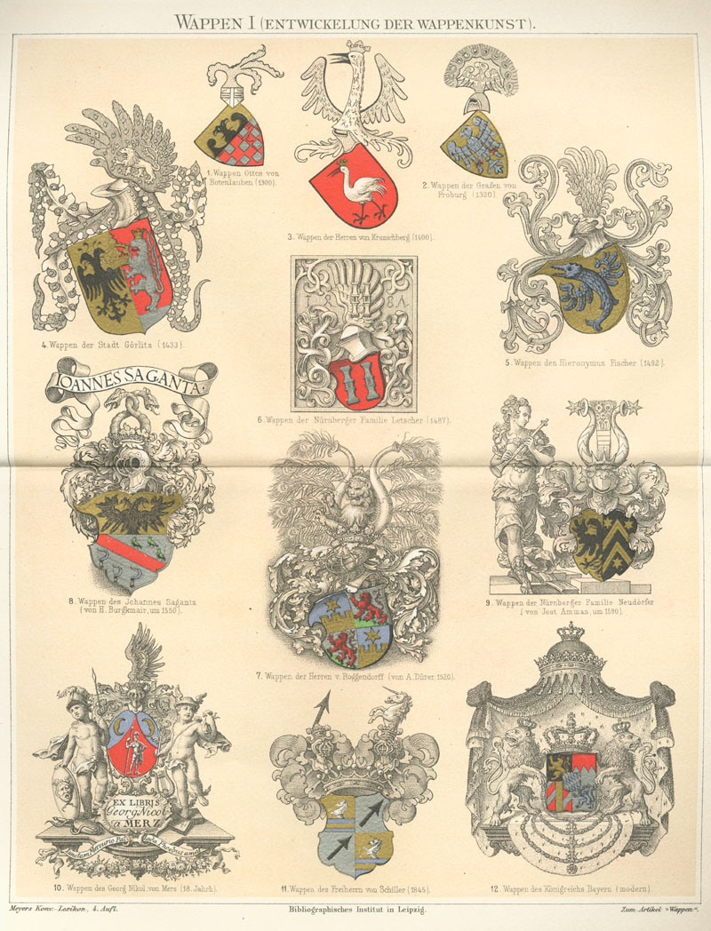 Meyers Konversations-Lexikon (Vierte Auflage, 1885 - 1892), 16. Band: Uralsk - Zz, Seite 384e: Wappen I (Entwicklung der Wappenkunst). Figur 1. Wappen Ottos von Botenlauben (1300). Figur 2. Wappen der Grafen von Froburg (1320). Figur 3. Wappen der Herren von Kranichberg (1400). Figur 4. Wappen der Stadt Görlitz (1433). Figur 5. Wappen des Hieronymus Fischer (1492). Figur 6. Wappen der Nürnberger Familie Letscher (1487). Figur 7. Wappen der Herren von Rogendorff (von A. Dürer, 1520). Figur 8. Wappen des Johannes Saganta (von Hans Burgkmair, um 1550). Figur 9. Wappen der Nürnberger Familie Neudörfer (von Jost Amman, um 1590). Figur 10. Wappen des Georg Nikol. von Merz (18. Jahrhunderts). Figur 11. Wappen des Freiherrn von Schiller (1845). Figur 12. Wappen des Königreichs Bayern (modern).